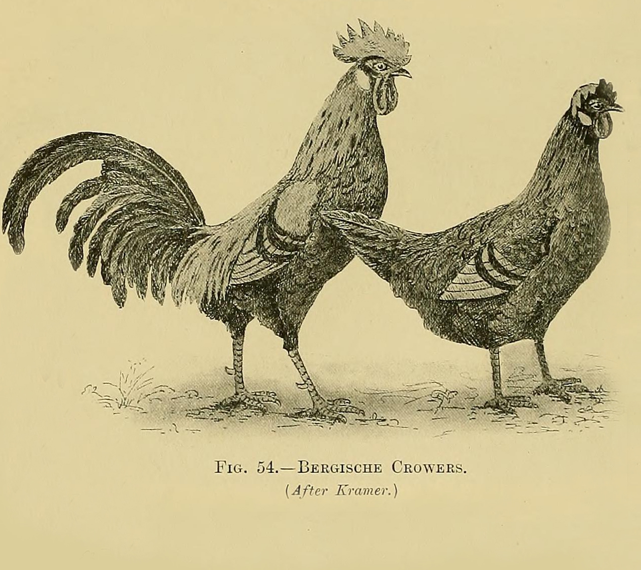 Bergse kraaier - haan en hen - volgens beschrijving van Kramer - Races of domestic poultry 1906